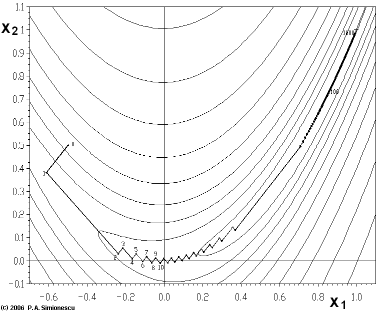 Illustration descente de gradient